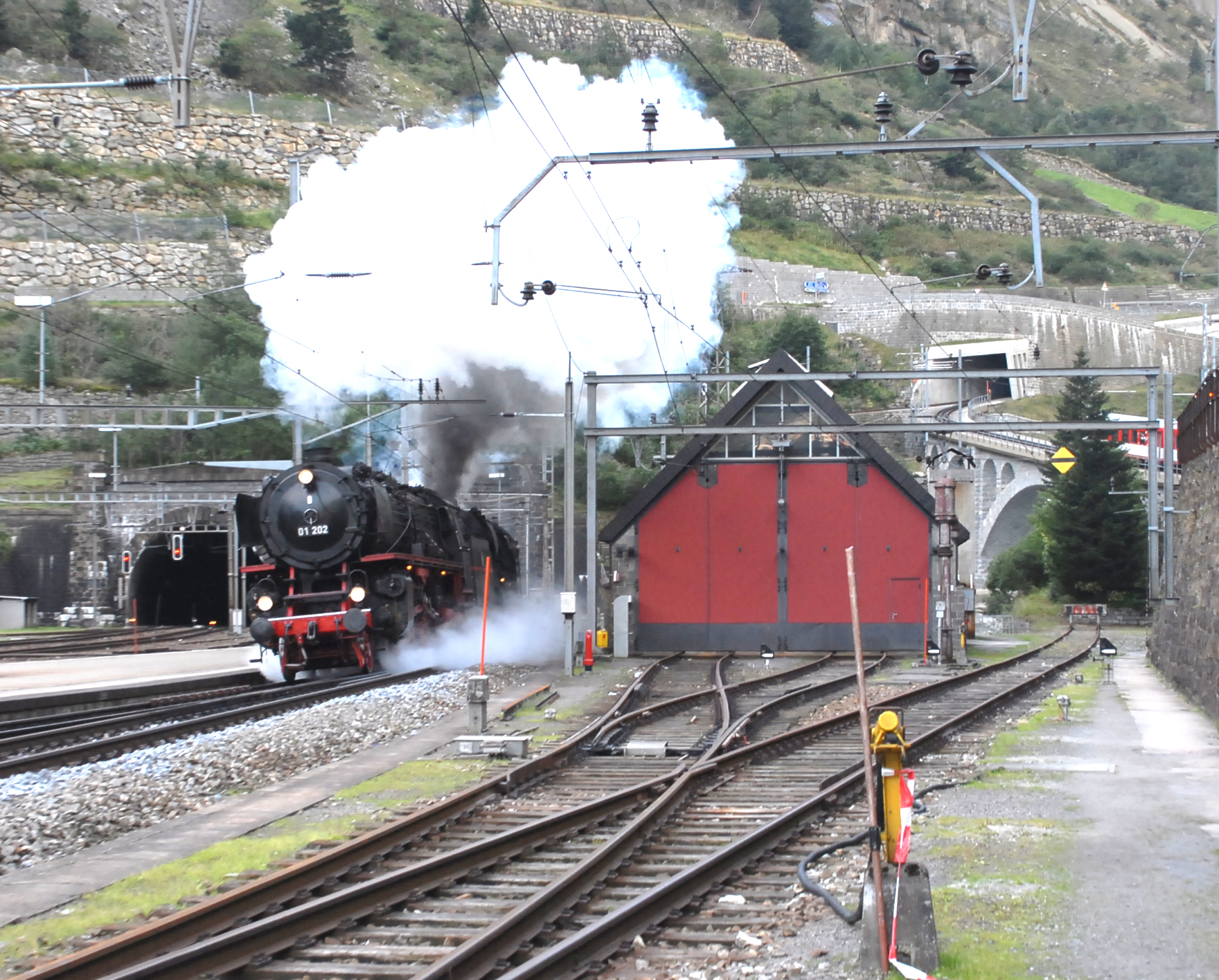 Trein van de Internationale Gesellschaft für Eisenbahnverkehr (IGE) ter gelegenheid van 125 Jaar Gotthard-Bahn van 7 tot 10 september 2007 met Verein Pacific locomotief 01 202 en Ulmer Eisenbahnfreunde locomotief 01 1066 bij de ingang van de Gotthardtunnel te Göschenen.